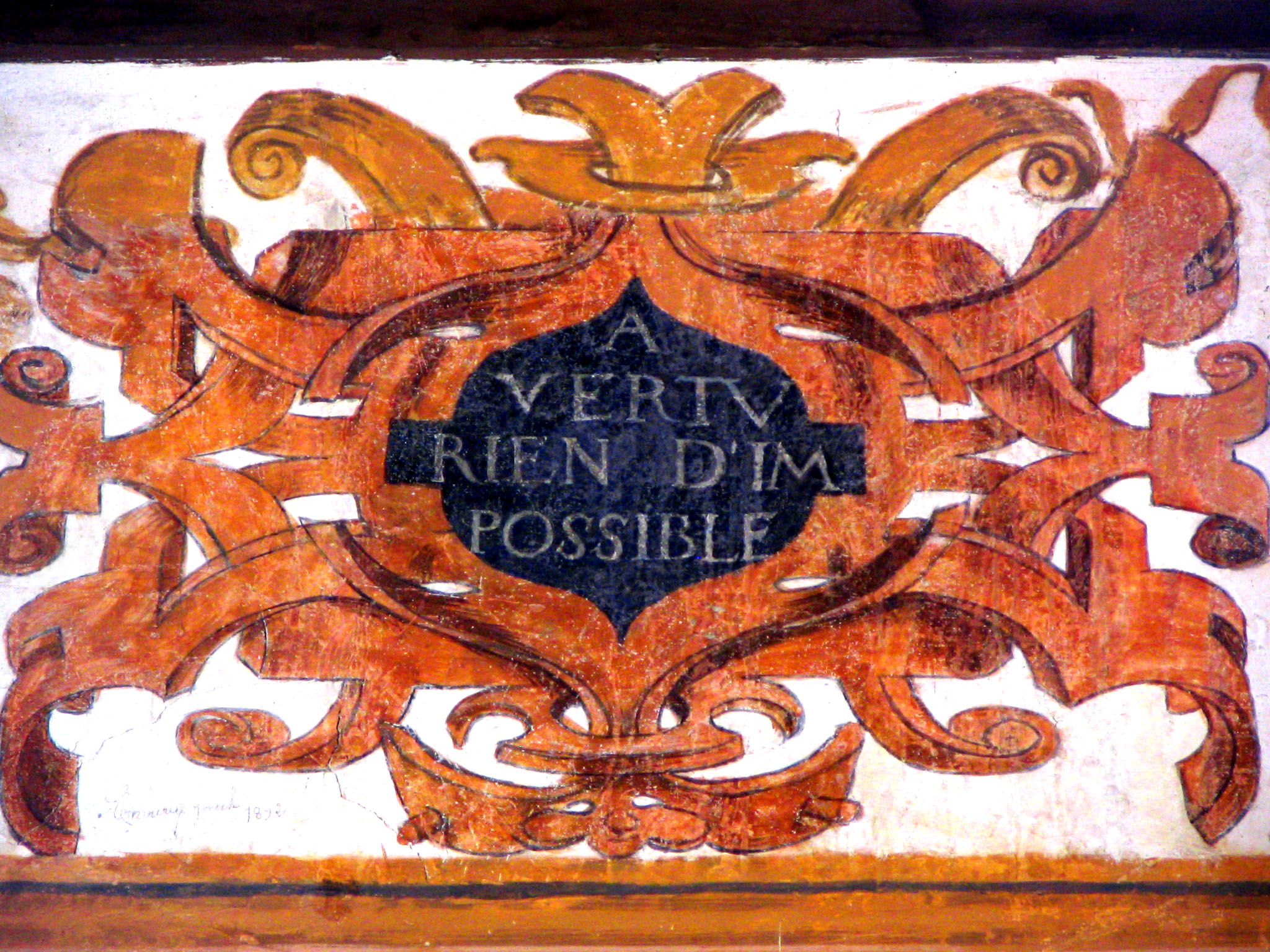 Détail de la frise moraliste d'époque Renaissance de la grande salle des Festins au château de Montmaur. "A VERTU RIEN D'IM POSSIBLE" .